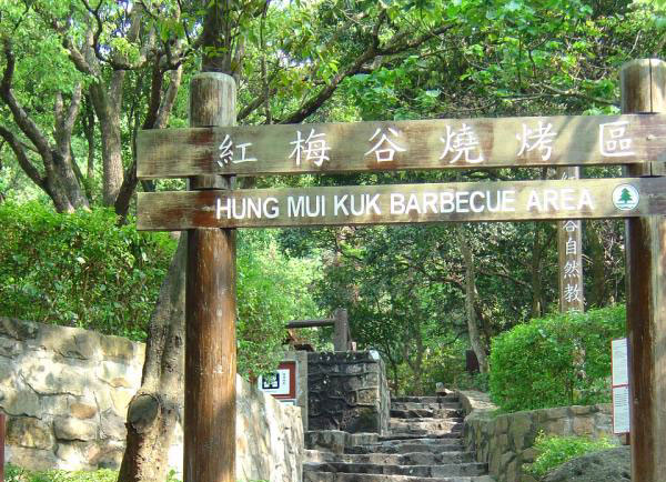 沙田紅梅谷燒烤區